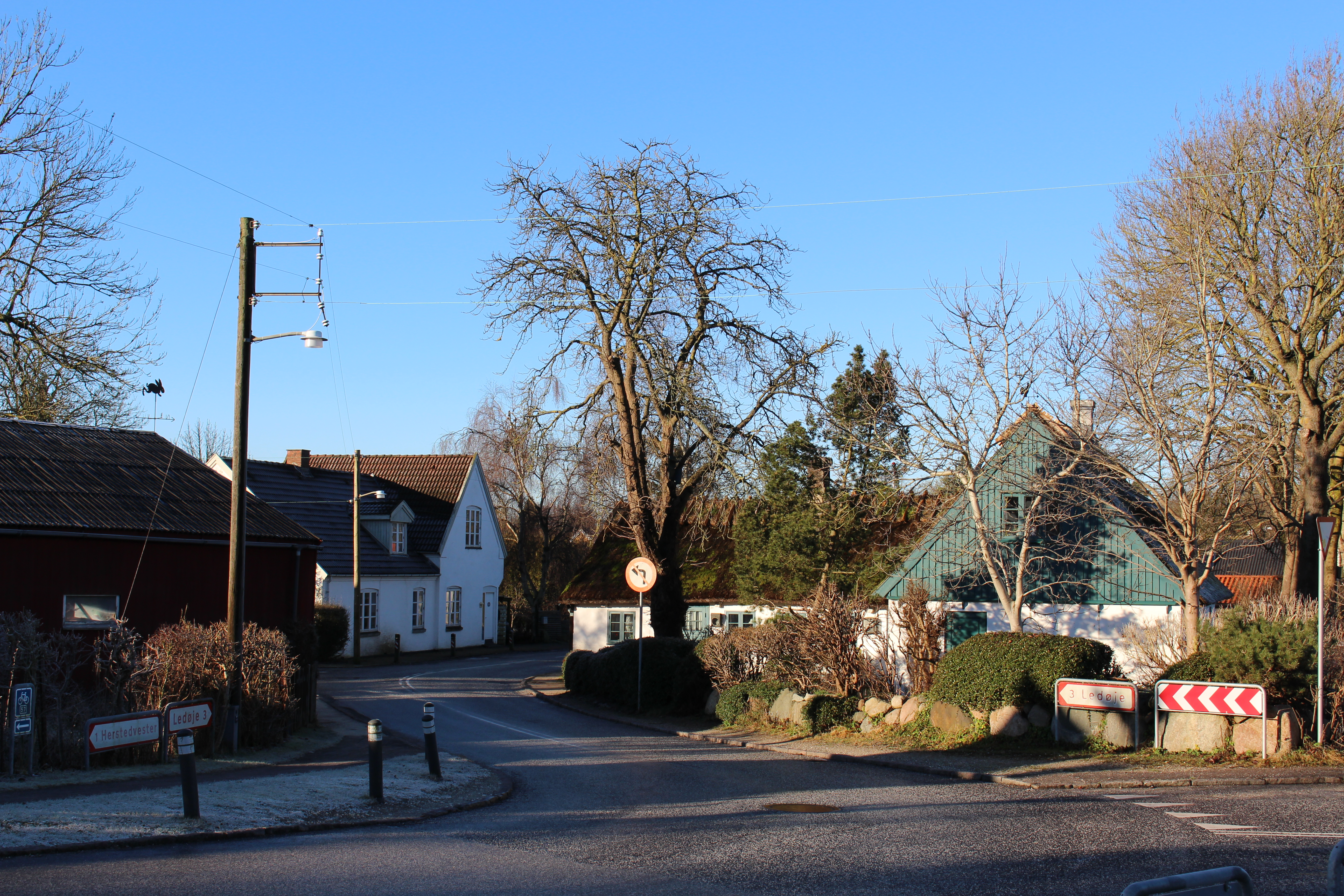 Risby i Albertslund